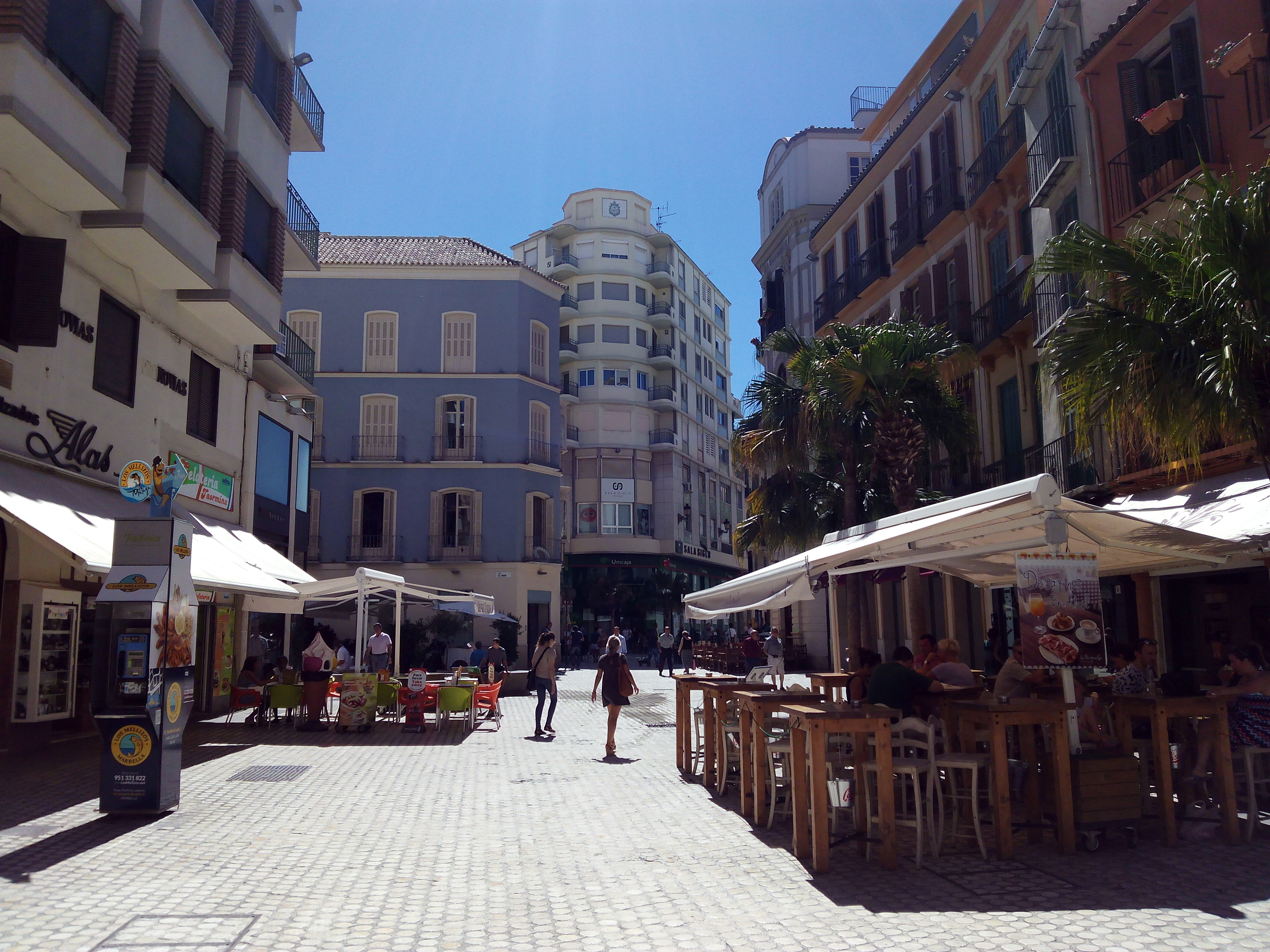 Plazas del Siglo y del Carbón, en el centro histórico de Málaga (España).